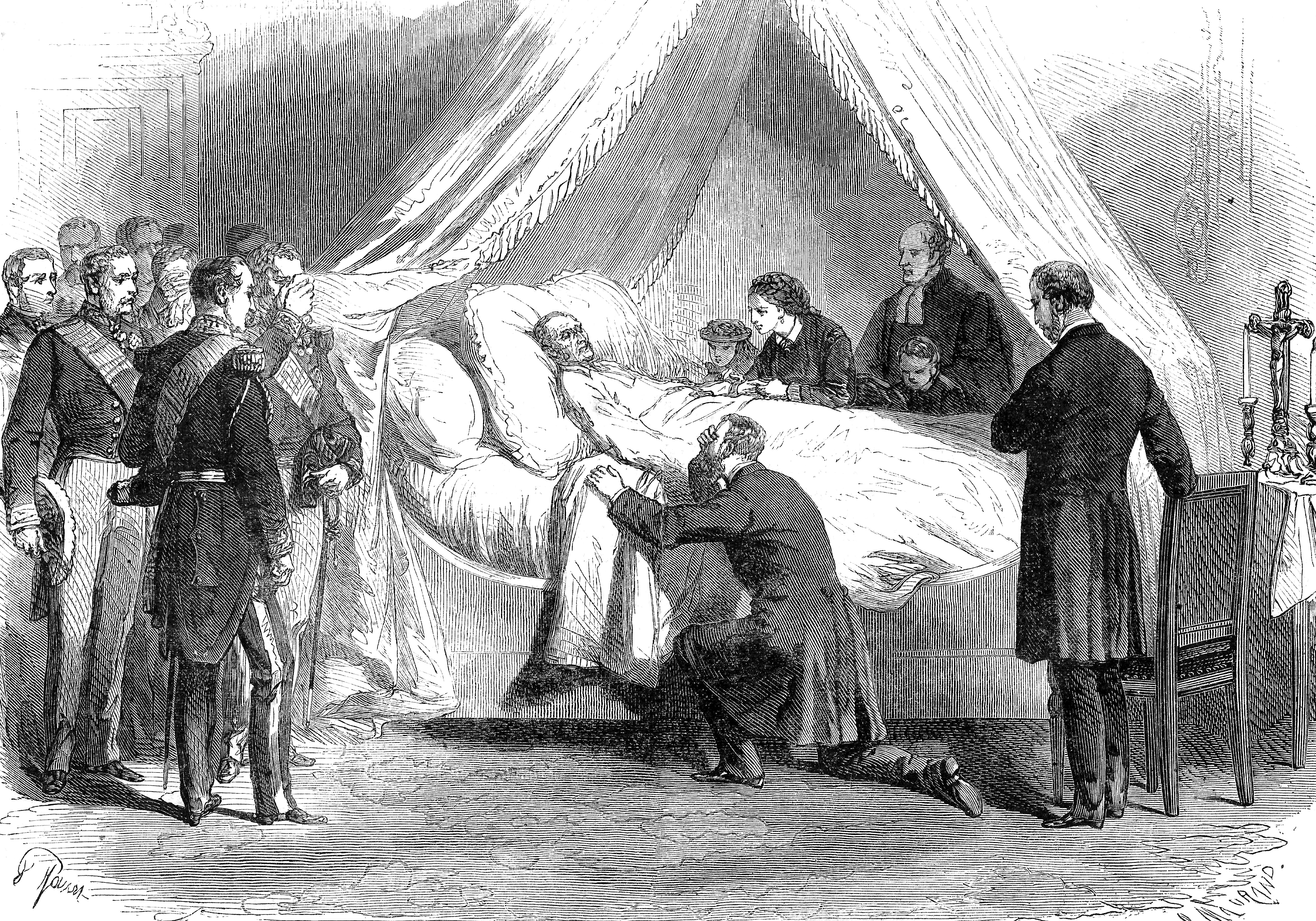 Mort du roi Léopold Ier de Belgique, château de Laeken, le 10 décembre 1865. — Mort du roi Léopold Ier, à l’âge de 75 ans et après 34 ans de règne, le dimanche 10 décembre 1865 à 11 heures 45. Le Roi s’était retiré depuis quelques jours dans la petite chambre des Gobelins, au rez-de-chaussée de l’aile gauche du château de Laeken. Sont présents, ses enfants : Léopold, duc de Brabant, et bientôt roi, Marie-Henriette, duchesse de Brabant, et bientôt reine, Philippe, comte de Flandre ; ses petits-enfants : la princesse Louise et le prince Léopold, comte de Hainaut, et bientôt duc de Brabant ; les présidents du Sénat et de la Chambre et les ministres ; Jules Van Praet, ministre de la Maison du Roi et son plus vieil ami en Belgique, le vicomte de Conway, intendant de la Liste civile, le pasteur Becker, chapelain du Roi.